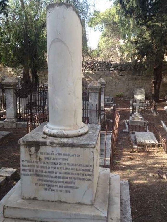 Hans Nicolajsen (auch John Nicolayson; Løgumkloster *1. Juni 1803 – 6. Oktober 1856* Jerusalem) aus dem Schleswigschen war ein Missionar im Heiligen Land für die London Society for Promoting Christianity Amongst the Jews. Grab auf dem Zionsfriedhof Jerusalem